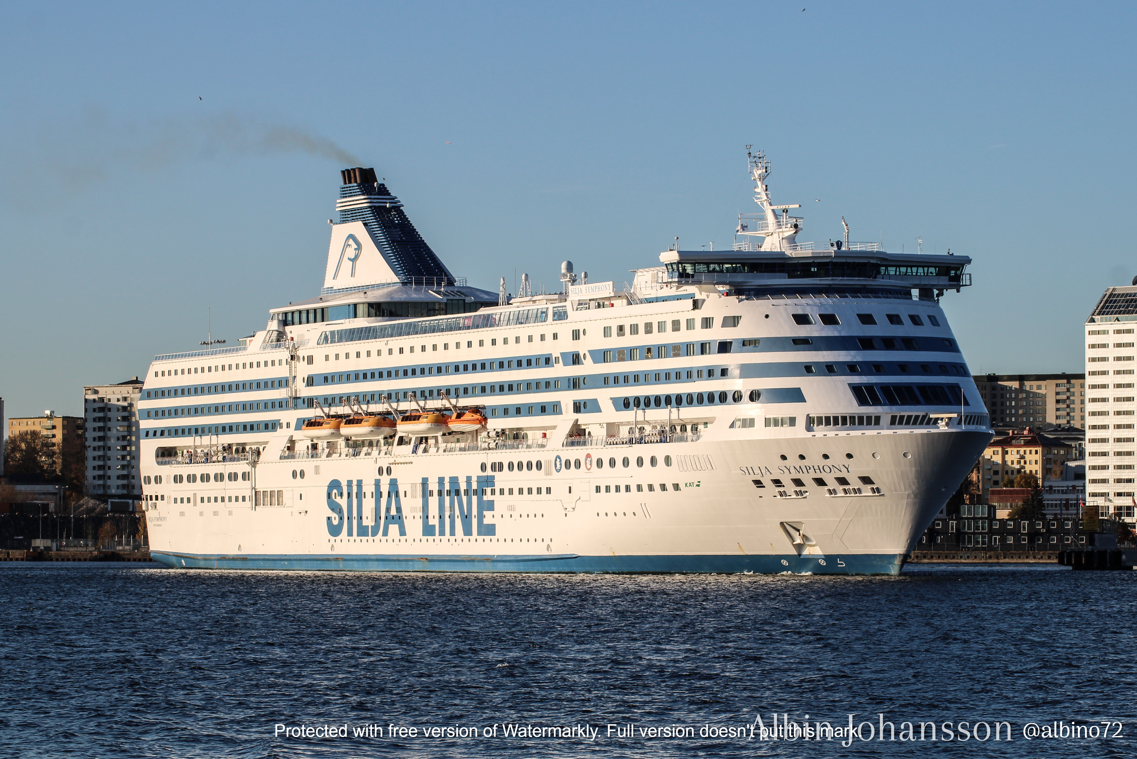 Silja Symphony förhalar pga icke funktionell stabilisator.